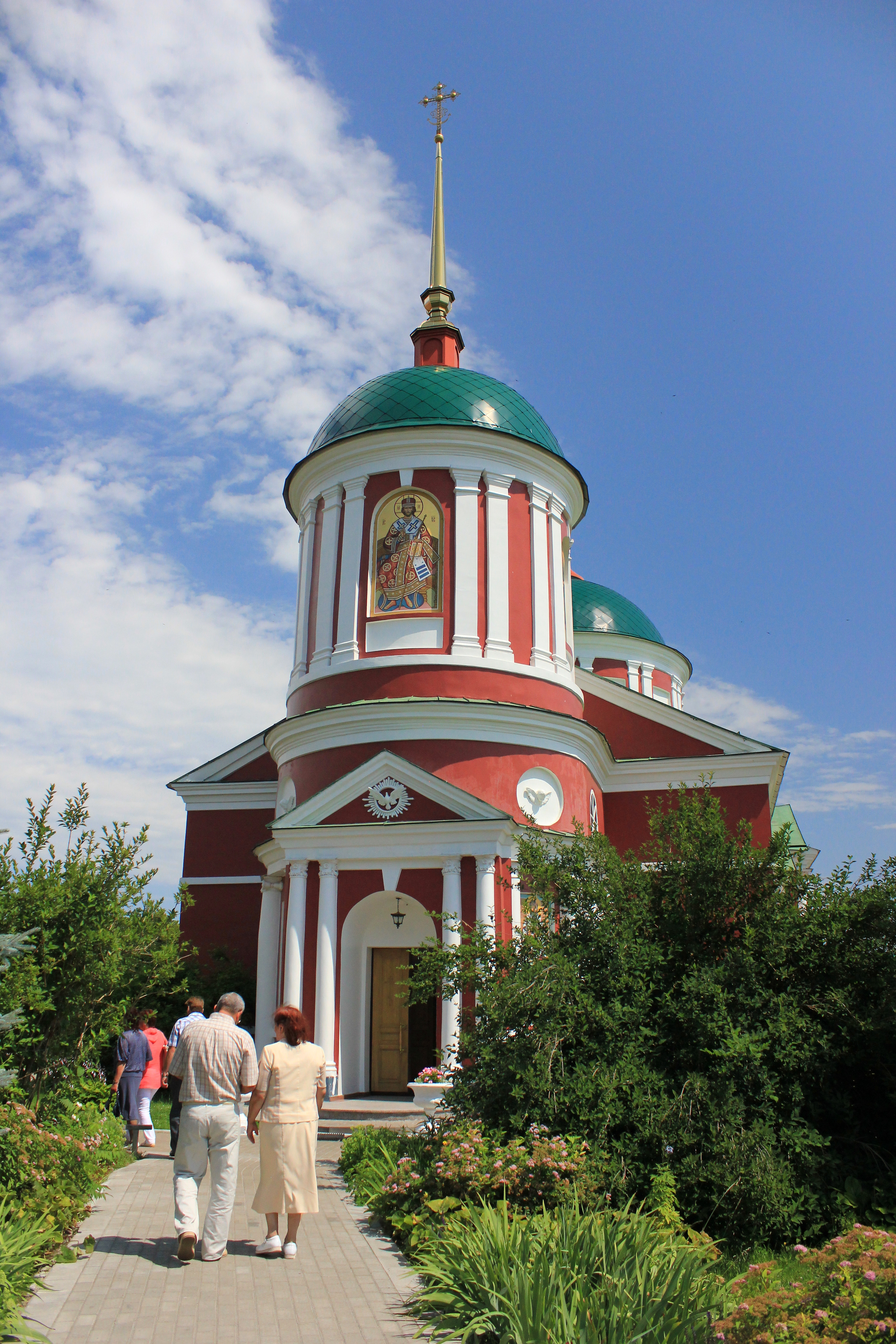 Год основания:1613. 242301, Брянская область, Брасовский район, п. Пчела. Россия.